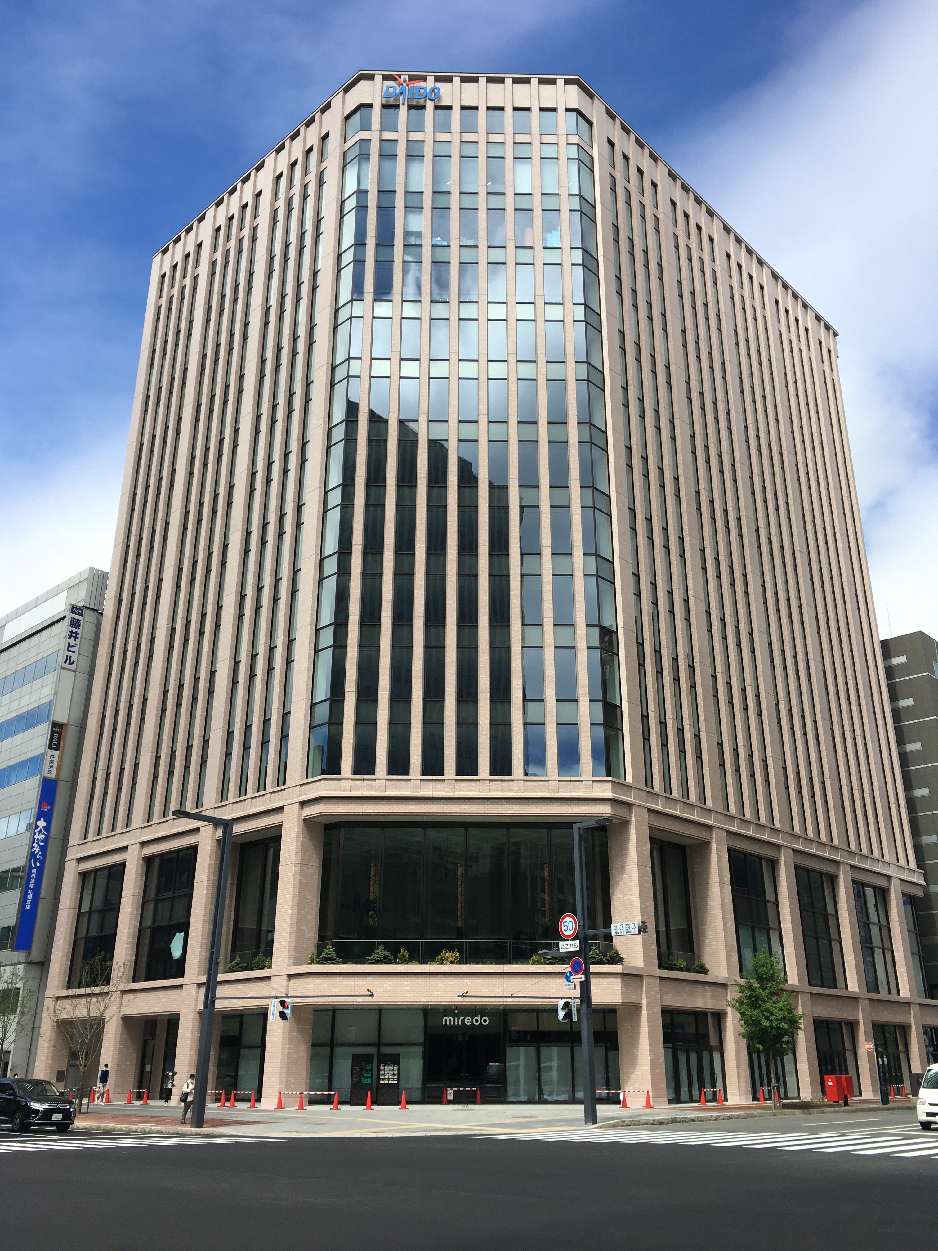 大同生命札幌ビル･miredo（札幌市中央区）